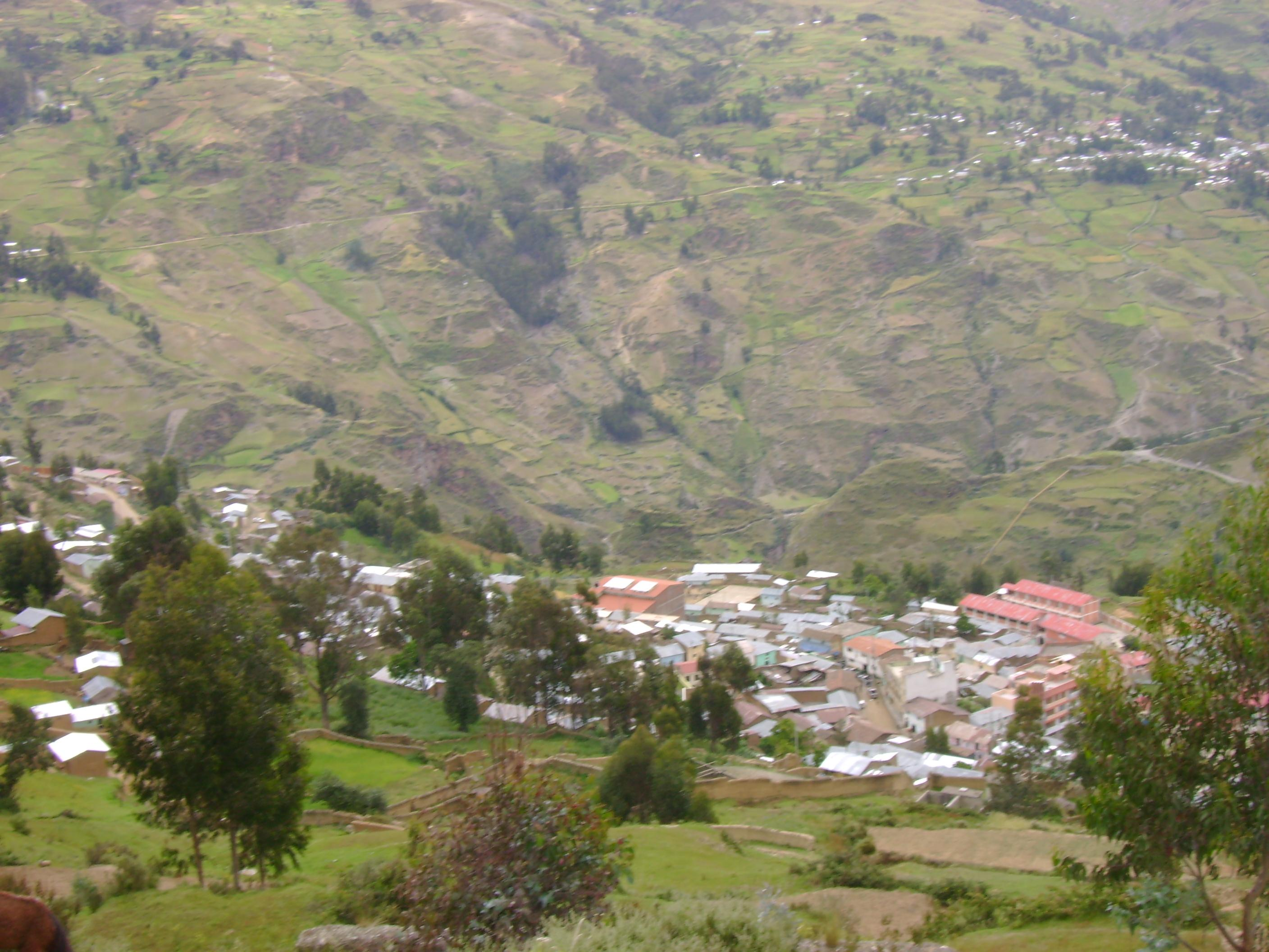 Chavinillo desde arriba